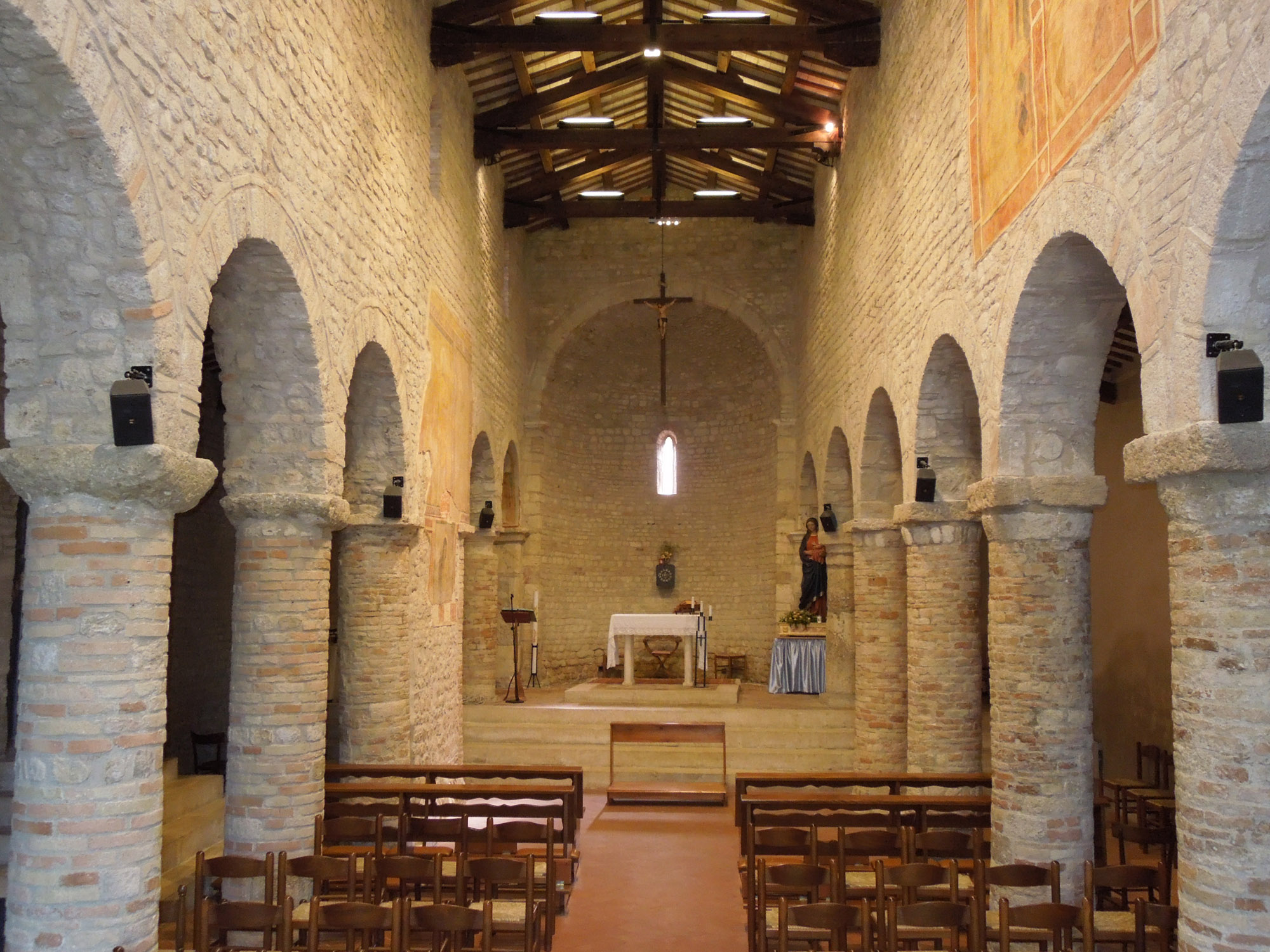 Interno della chiesa di Santa Maria a Vico di Sant'Omero in provincia di Teramo.